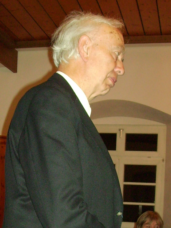 Klaus Berger am 3. März 2009 in Hechingen, Bildungshaus St. Luzen